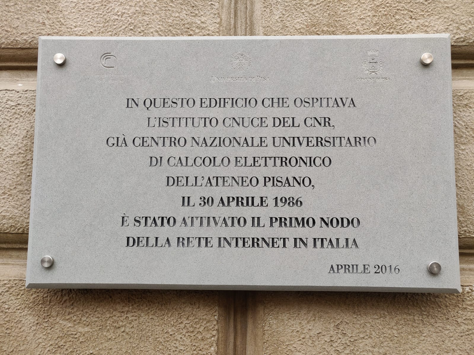 Targa commemorativa di Palazzo Venera che ricorda la prima connessione ad Internet in Italia